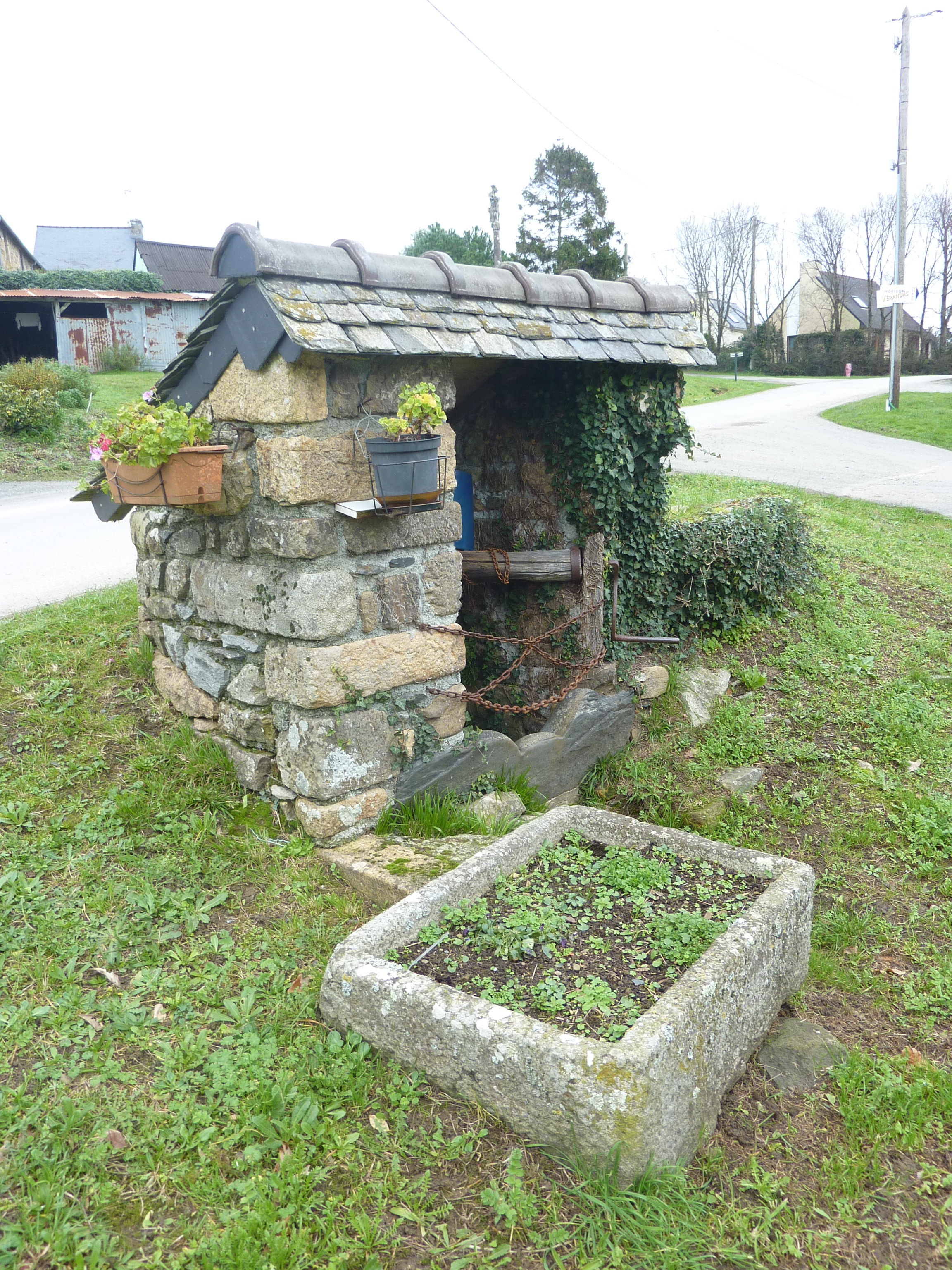 Hanvec : le puits de Kerohant